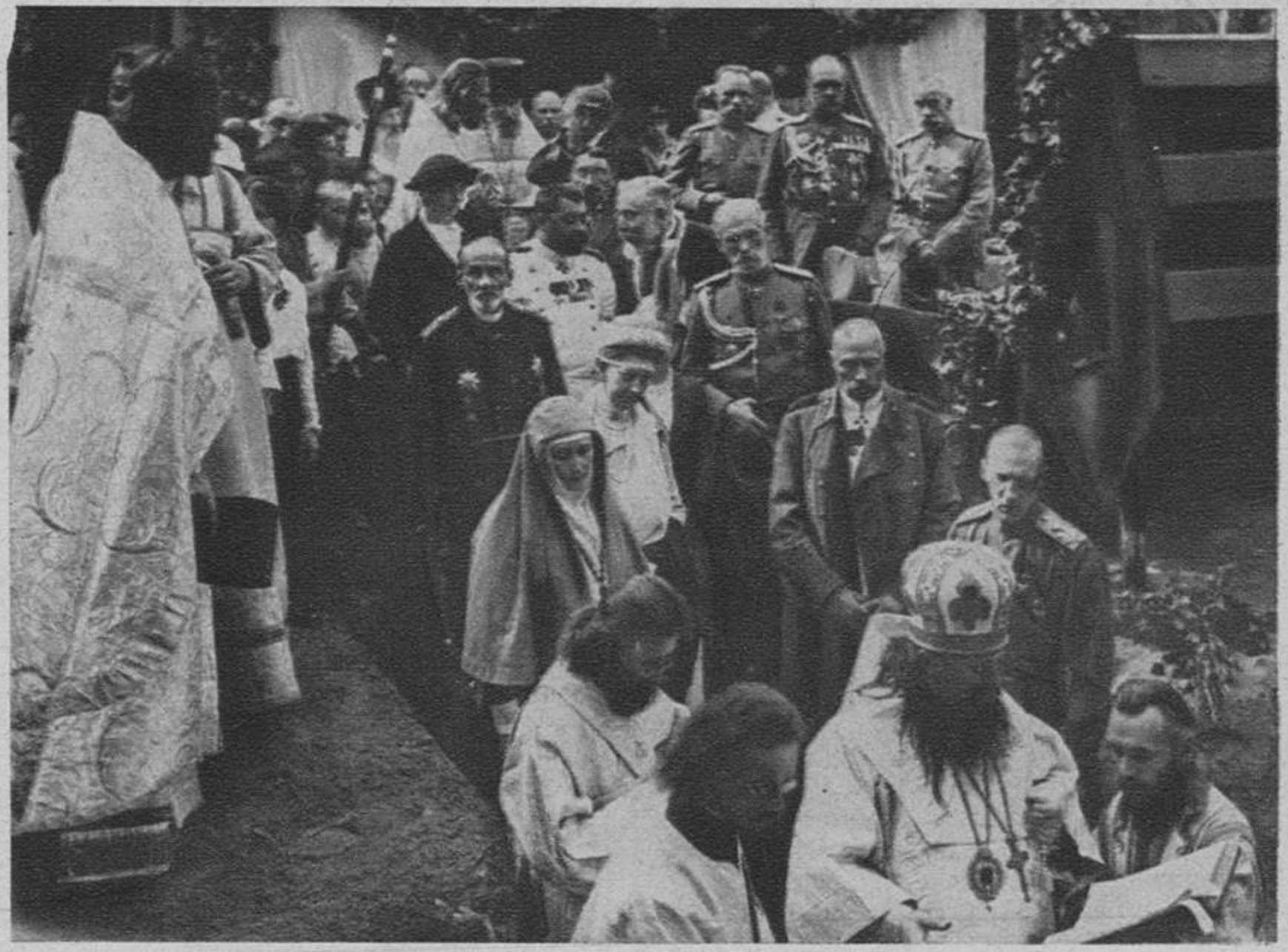 Закладка храма Спаса Преображения на Московском городском Братском кладбище для жертв Первой мировой войны. На переднем плане - священнослужители во главе с епископом можайским Димитрием. За ними - Великая княгиня Елизавета Фёдоровна и Великий князь Иоанн Константинович. За ними - супруги Катковы, пожертвовавшие средства на строительство храма.